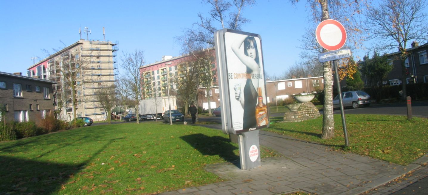 Mechelen: Zicht op het Plein der Verenigde Natiën, aan het Oud Oefenplein, noordwaarts, foto Marc Alcide 25 december 2005